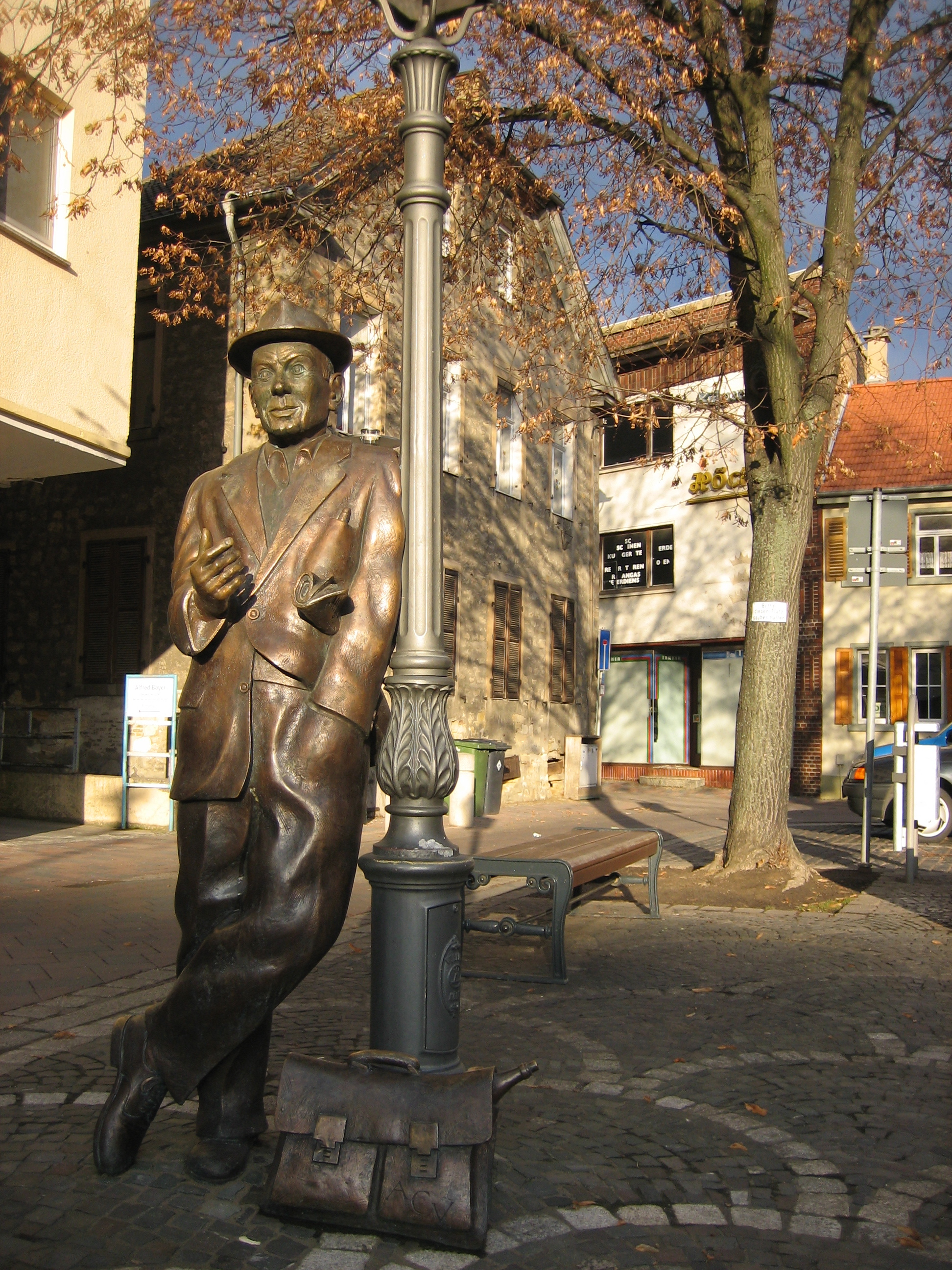 Memorial in Alzey (Germany) "Schnatz vum Kroneplatz"